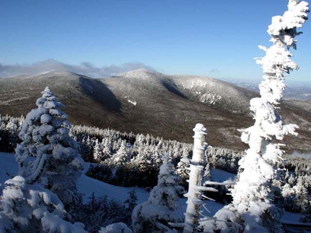 View From Sugarloaf